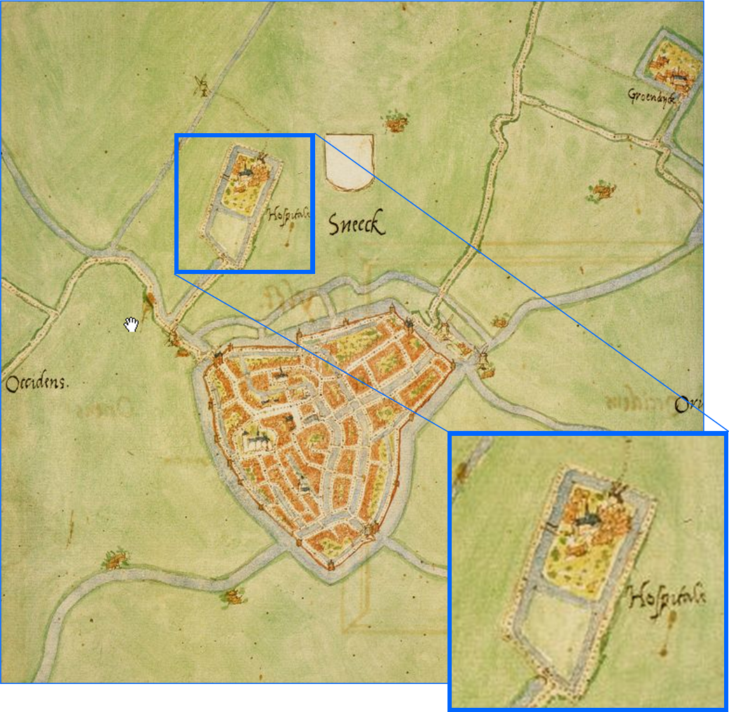 Monastery Sint-Jansberg on map made by Jacob Deventer